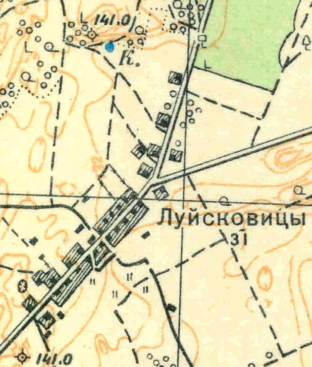 Топографическая карта Ленинградской области, квадрат О-35-24-Б-в (Вохоново), деревня Луйсковицы